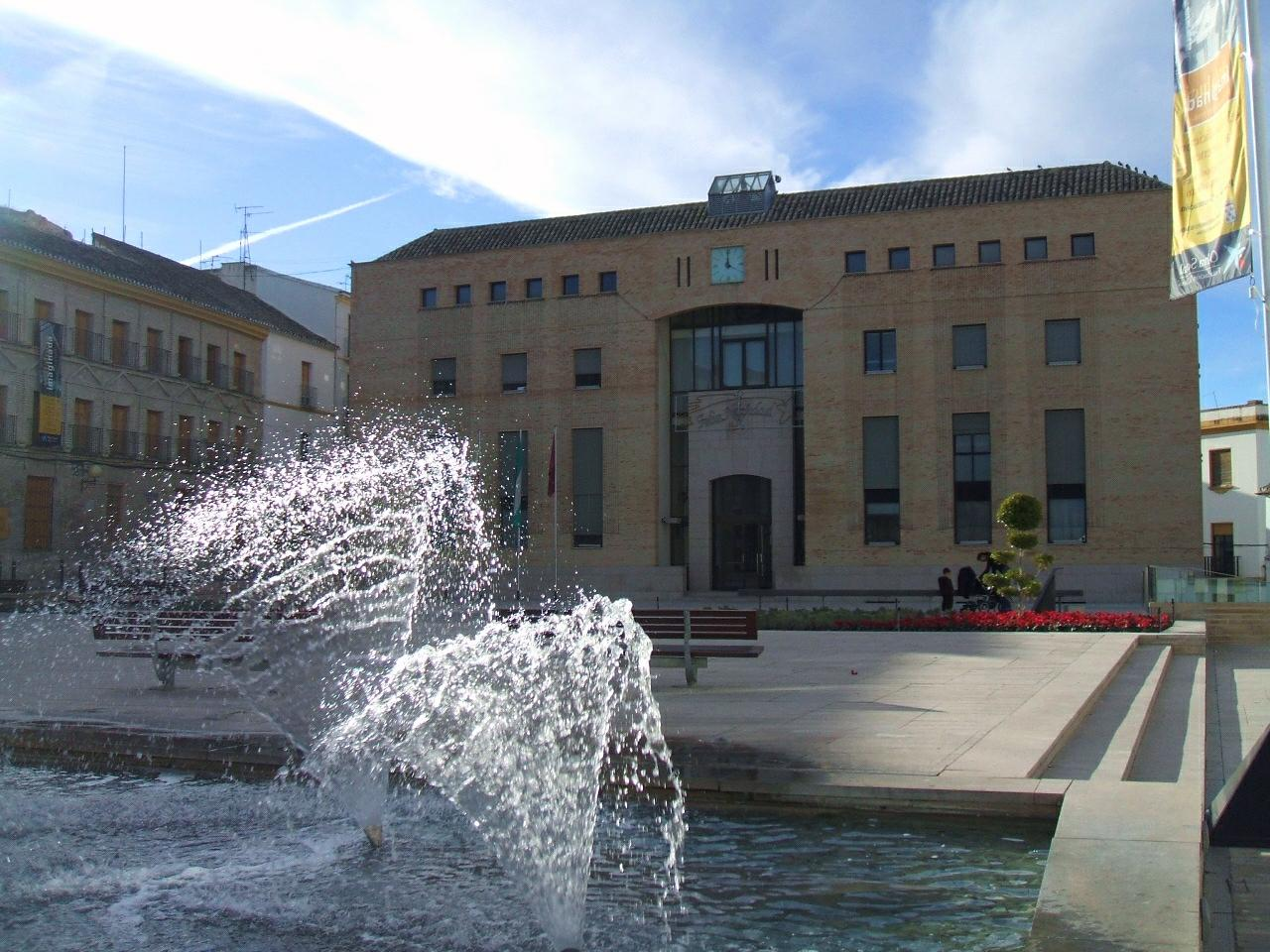 Ayuntamiento de Baena (Córdoba, Andalucía, España)